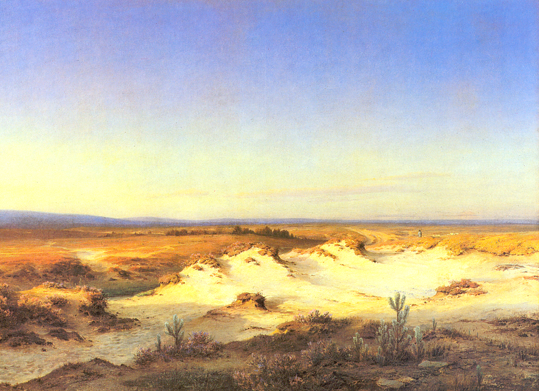 Zitiert aus der Bildbeschreibung des unten genannten Buchs: Ölgemälde von Ludwig Menke aus dem Jahre 1865 (Lippisches Landesmuseum).